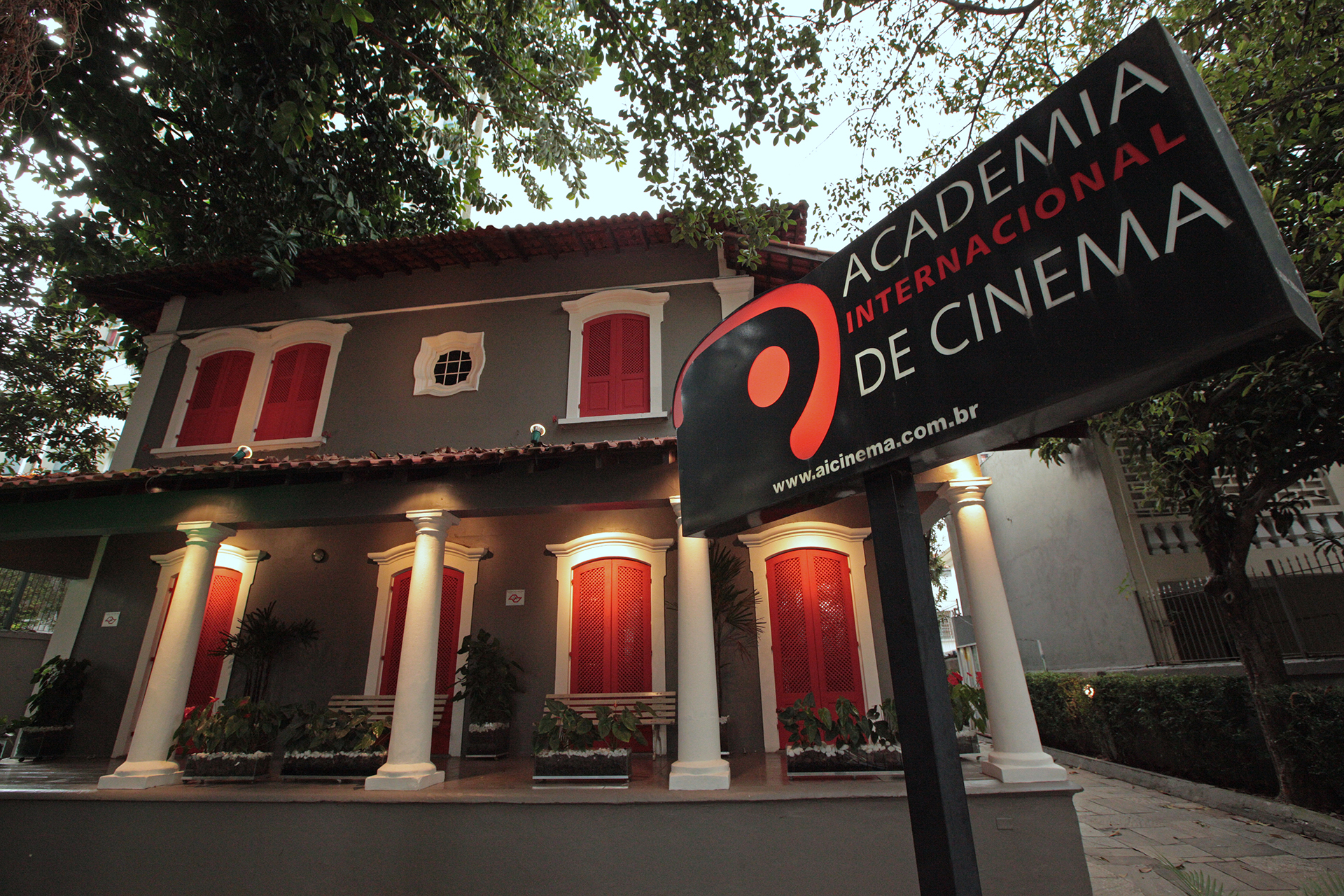 Sede da Academia Internacional de Cinema (AIC) - São Paulo Foto Alessandra Haro